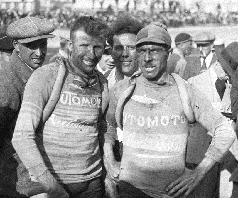 Tour de France 1926 : Joseph Van Dam à l'arrivée avec Omer Huyse